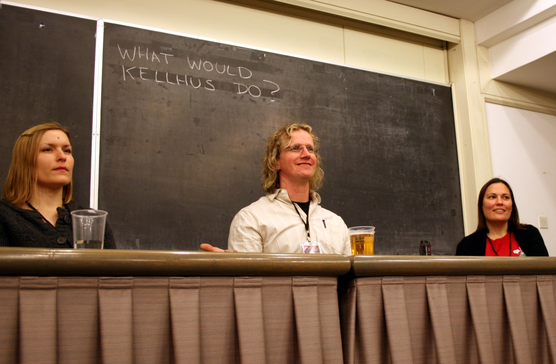 R. Scott Bakker na SFeraKonu 2009.